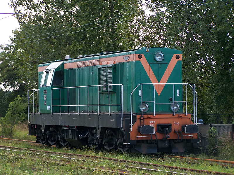 Lokomotywa SM31-044 na stacji Leszczyny